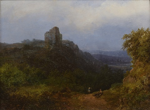 Luise Piepenhagen - Pohled na hrad s zalesněném údolí